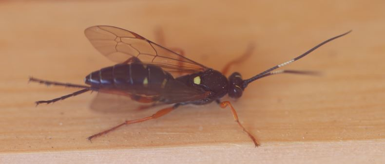 Vierfleck-Höhlenschlupfwespe (Diphyus quadripunctorius), Weibchen, am 18. Juni 2020 südlich von Mannheim